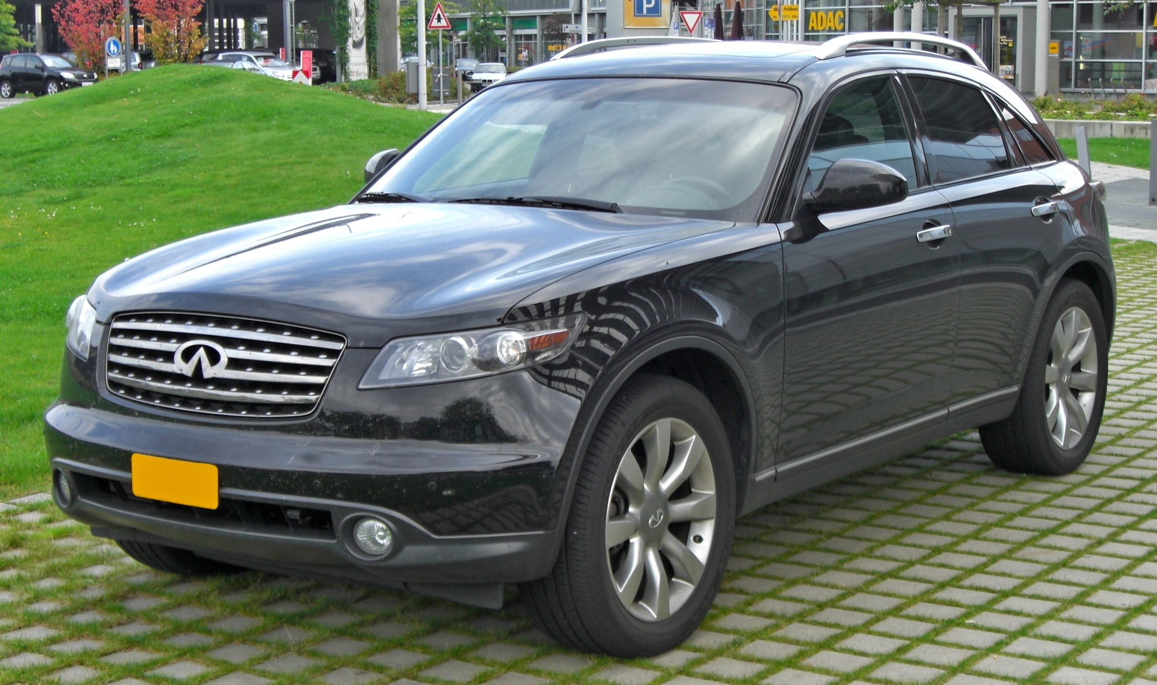 Infiniti FX